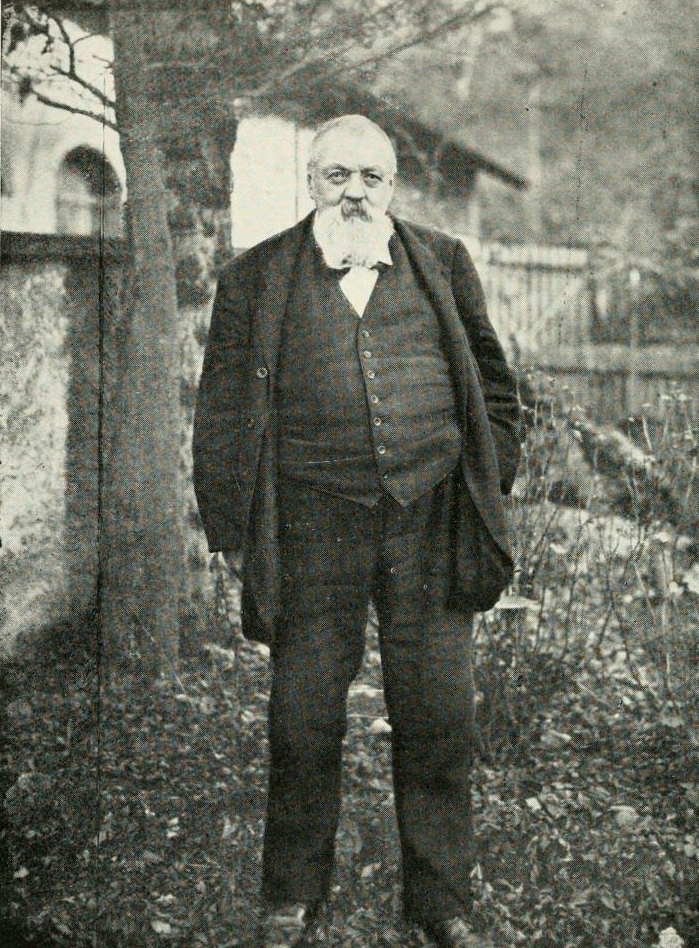 Hermann Fischer-Sigwart in 1917